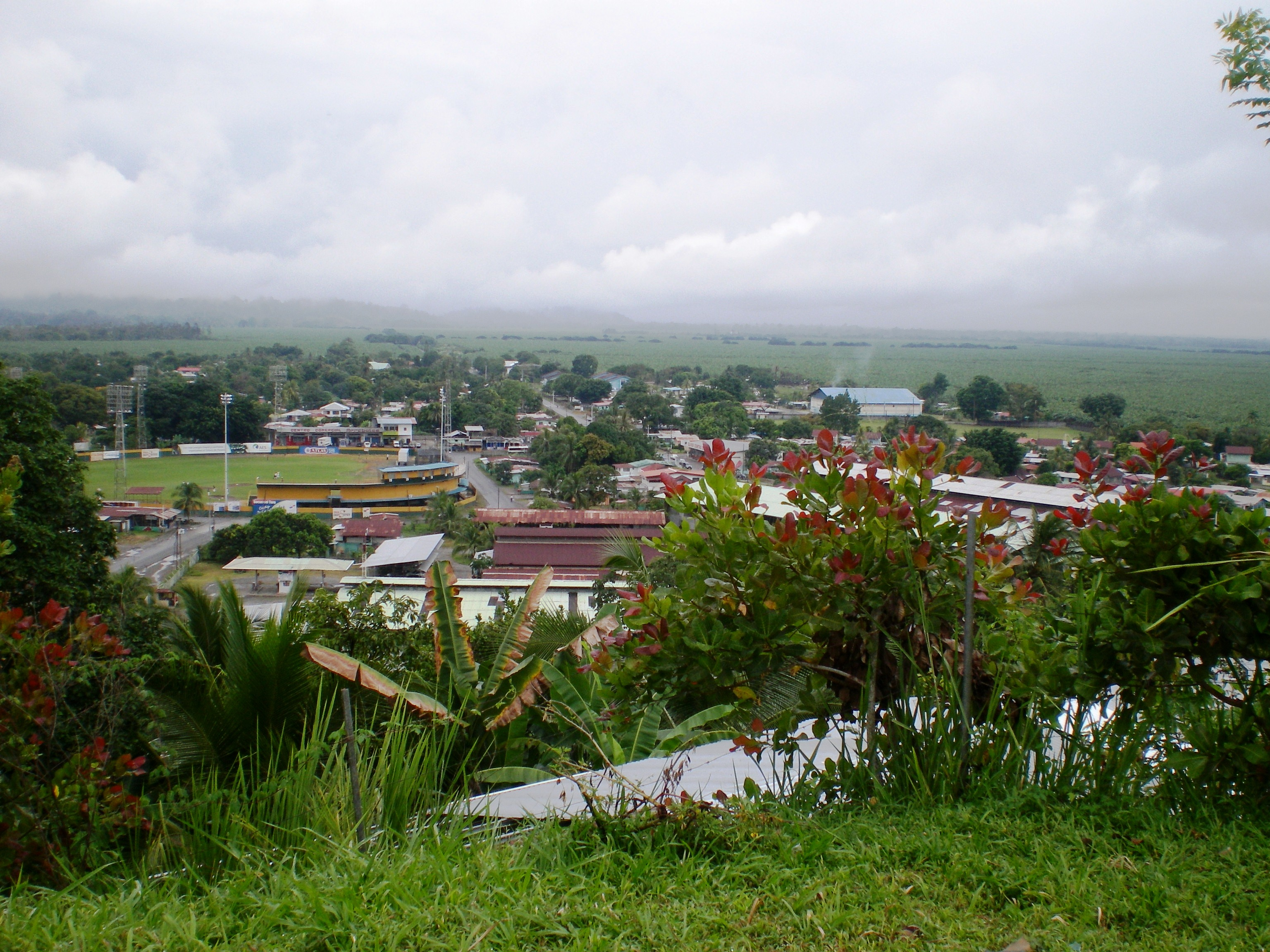 El Empalme